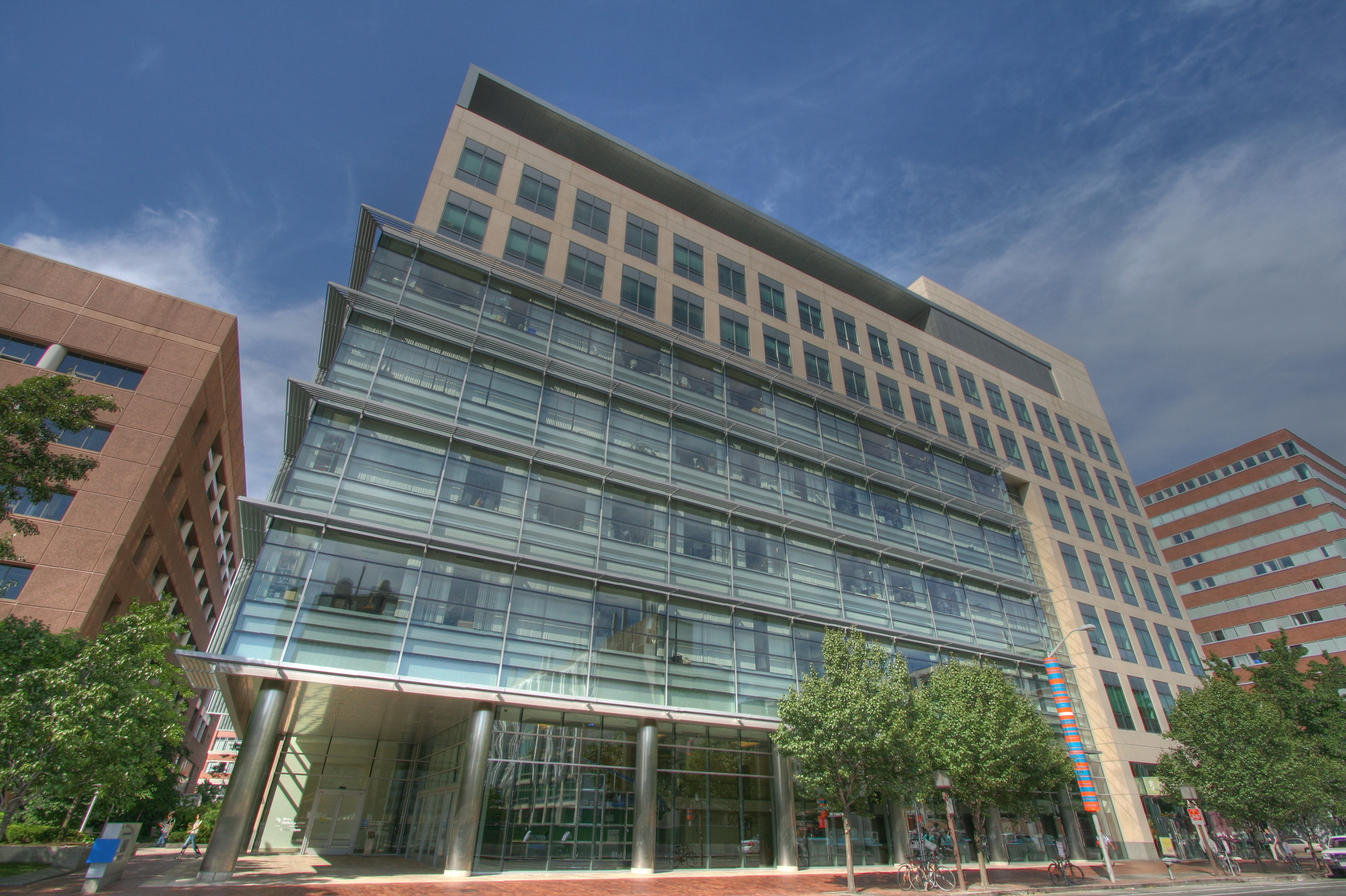 Sede del Instituto Broad del MIT y Harvard, Cambridge, Massachusetts, EEUU